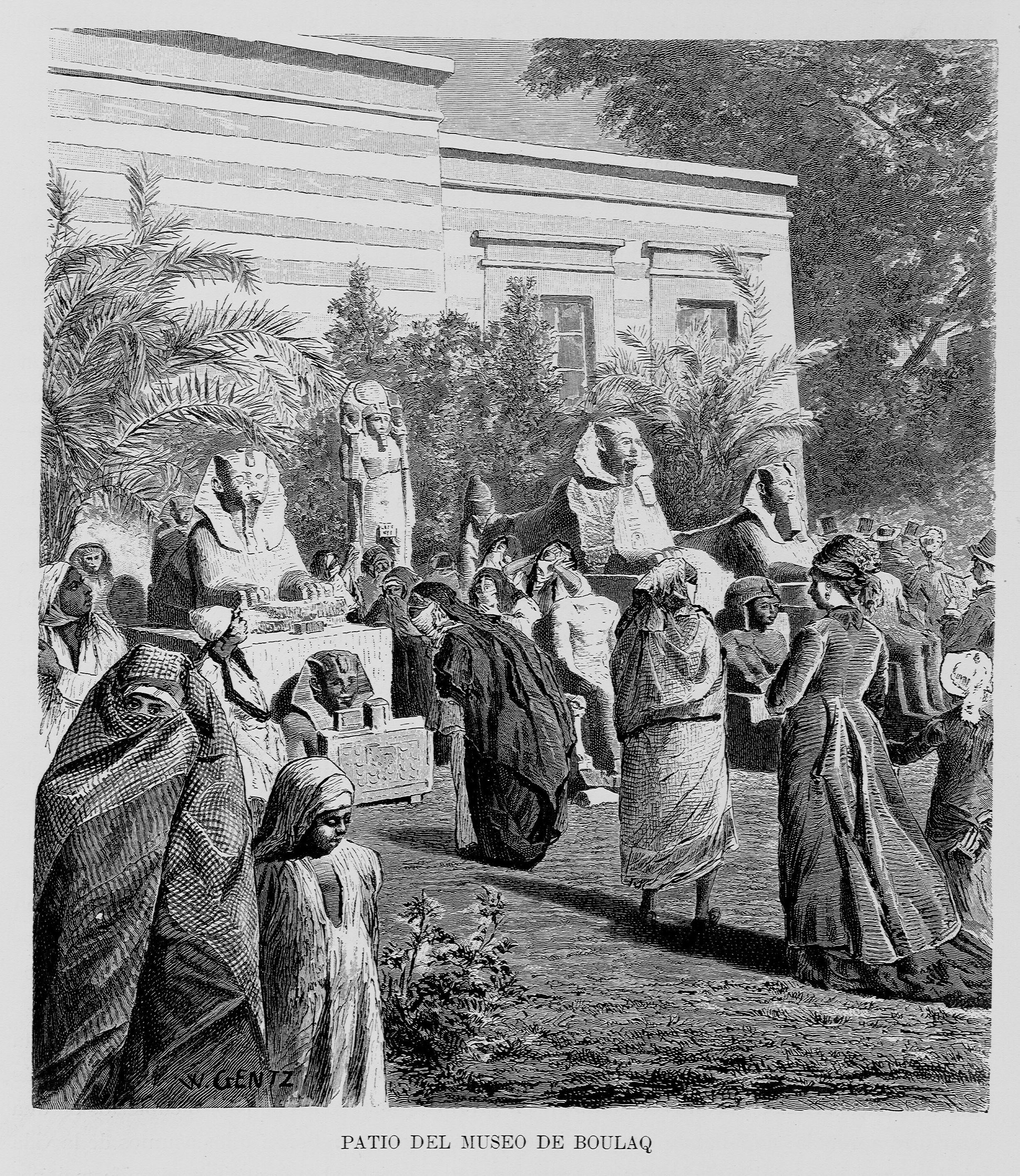 Autor: Ebers, Georg Moritz, 1837-1898 Descripción bibliográfica: Egipto / por Jorge Ebers ; traducción directa del alemán por Antonio Bergnes de las Casas, revisada y corregida por Cayetano Vidal de Valenciano. - Ed. monumental ilustrada con 650 grabados ... del reputado pintor Cárlos Werner. - Barcelona : Espasa y Compañía, 1882?. - 2 v. (X, 408, [1] p., [14] h. de lám. ; 438, [1] p., [14] h. de lám.). : il. ; 40 cm Materia: Egipto - Historia Materia: Egipto - Descripciones y viajes - Siglo 19 Notas: Palau, t. 5, p. 1, lo fecha de manera aproximada en 1882. - Port. a dos tintas. - Antep. - Ilustrada con 650 grabados intercalados en el texto y enriquecida con dos cartas geográficas tirada a tres tintas, una portada en colores y 24 magnificas imitaciones de las artísticas acuarelas del pintor Carlos Weiner Traductor:Bergnes de las Casas, Antonio, 1801-1879 Ilustrador:Werner, Karl, 1821-1888, il. Localización: Libro completo